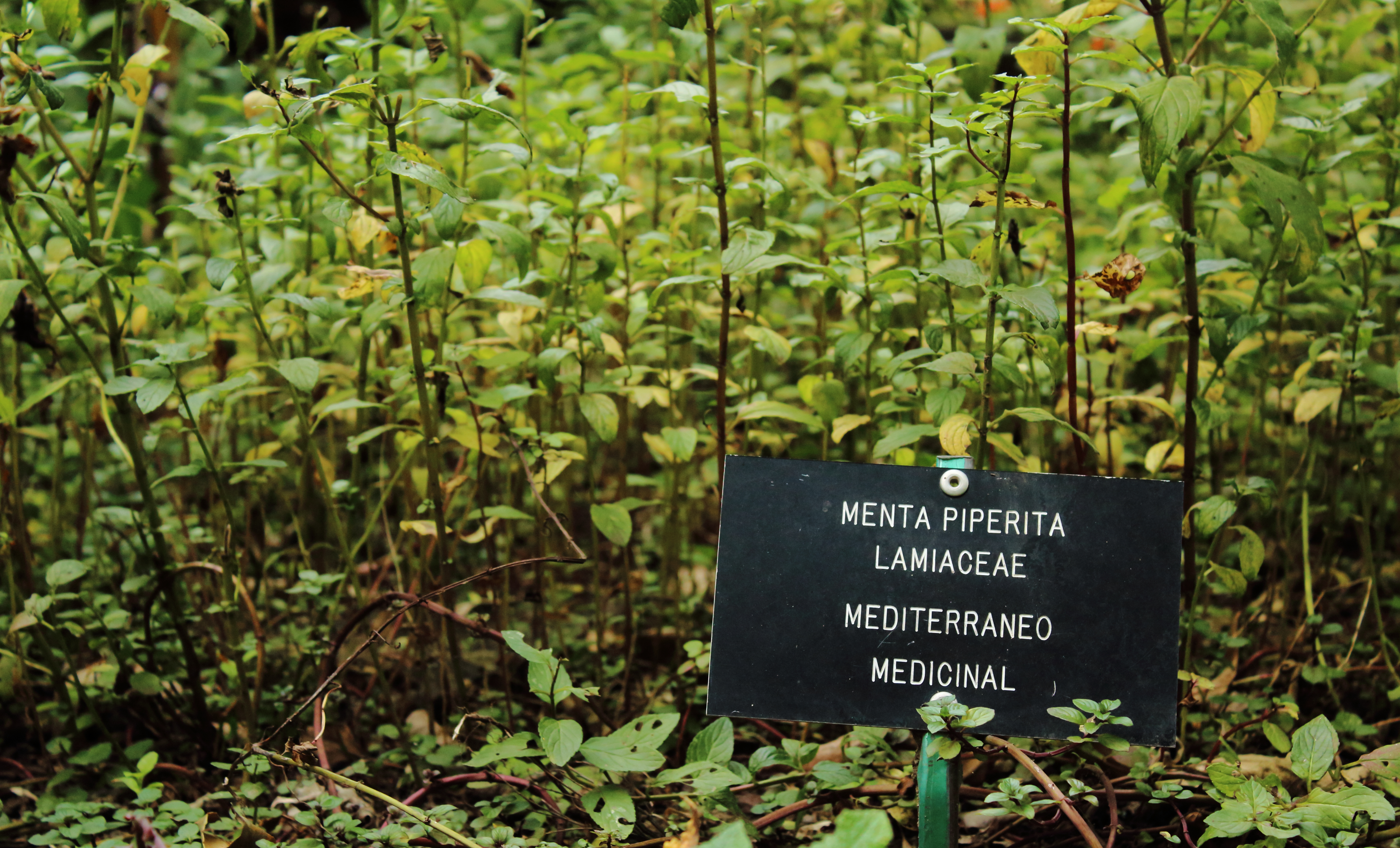 Breve descripción sobre la Menta piperita lamiaceae en el jardín botánico de la UNAM, México.